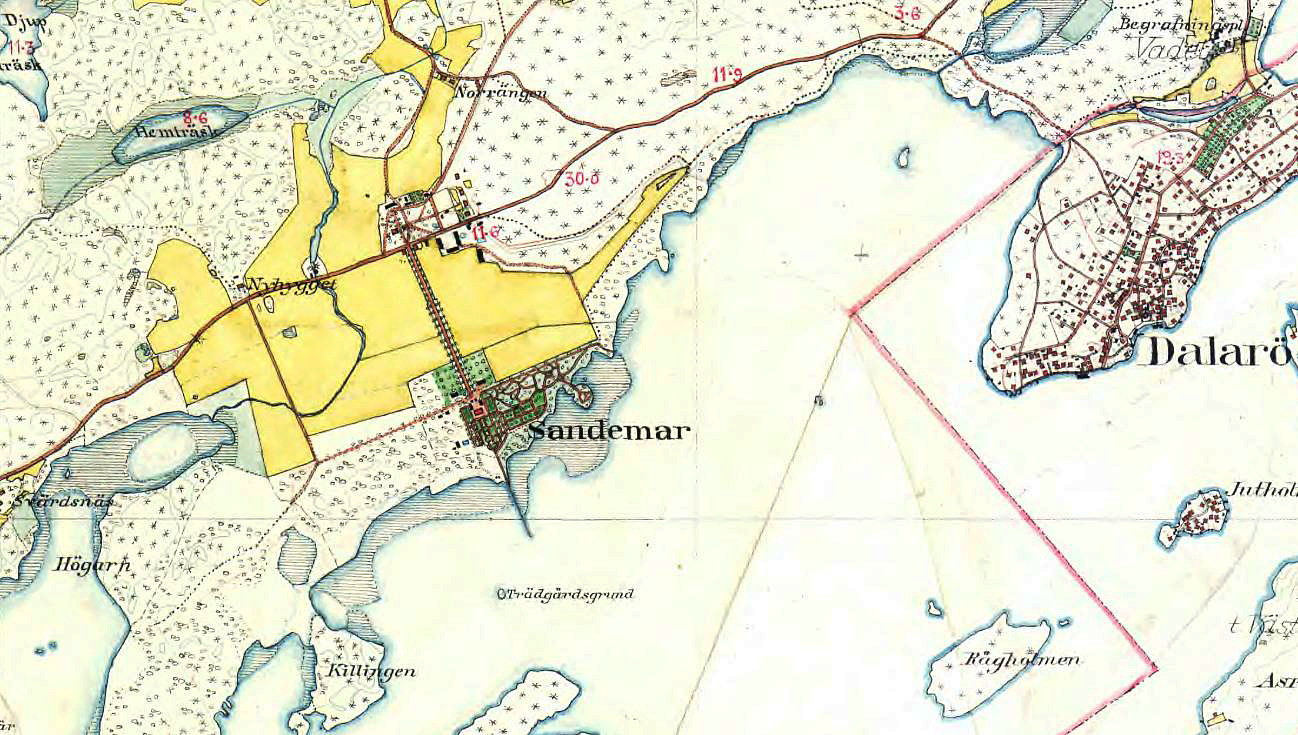 Sandemar och Dalarö på Häradsekonomiska kartan